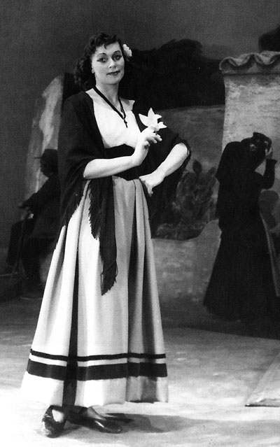 Elisabeth Söderström as Lola in Cavalleria rusticana